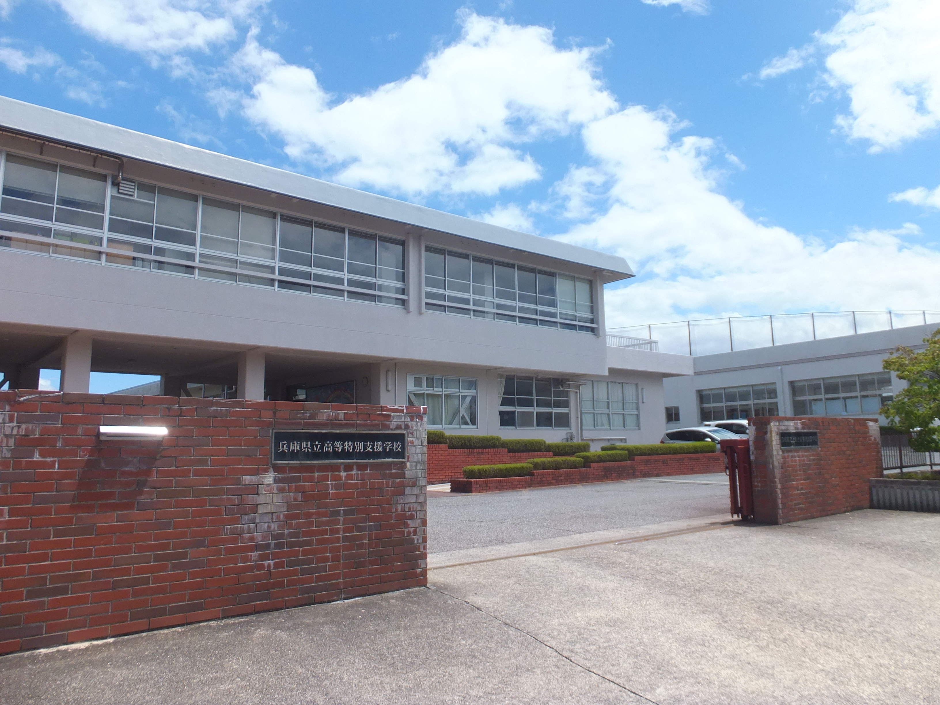 兵庫県立高等特別支援学校の校門から見た校舎